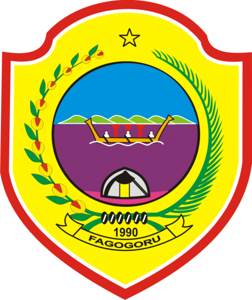 Lambang Kabupaten Halmahera Tengah